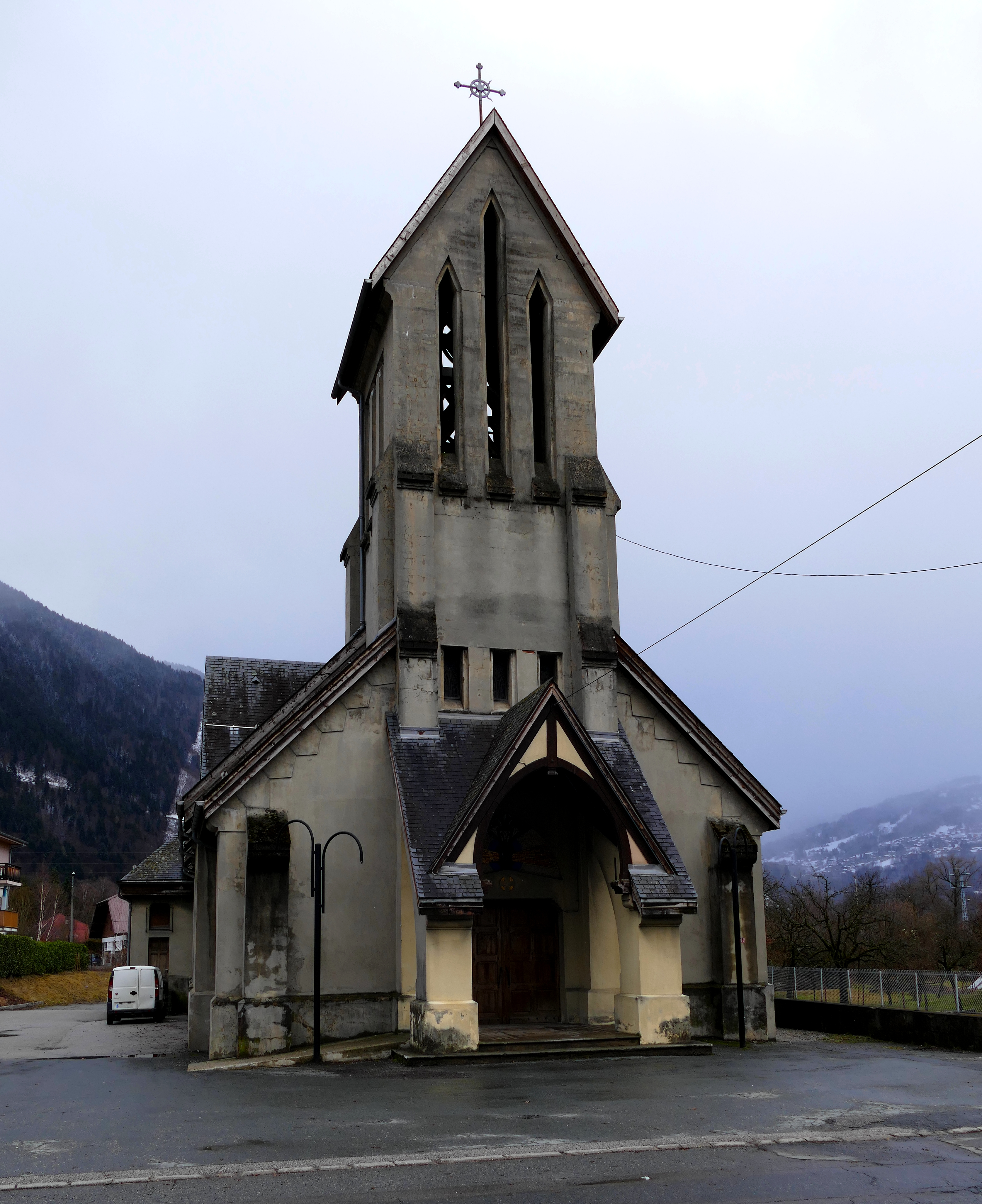 Église Saint-Joseph du Hameau de Chedde (1934), commune de Passy, en Haute-Savoie (France).